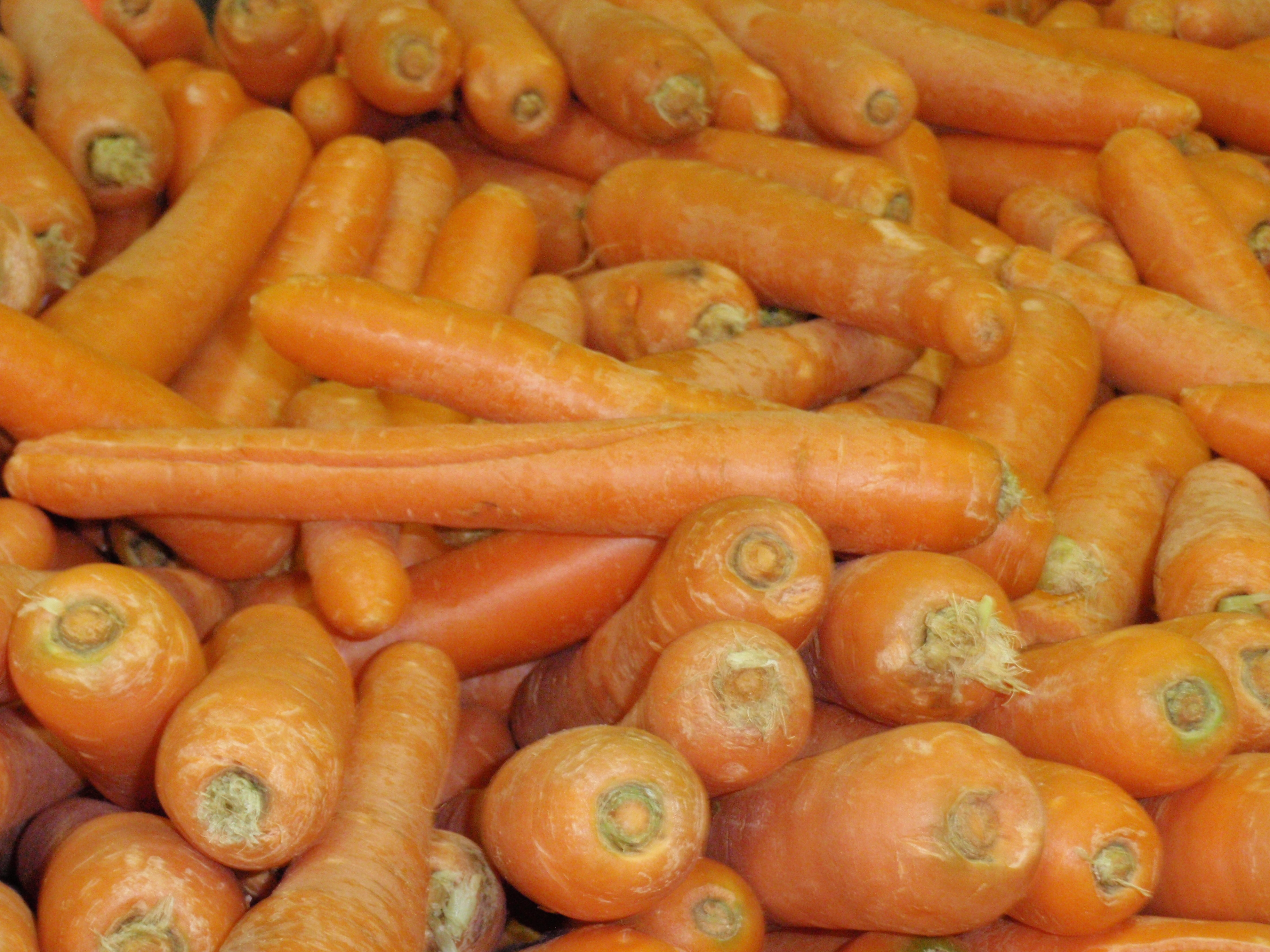 Shuk Hsayarim ירקות בשוק הסיירים